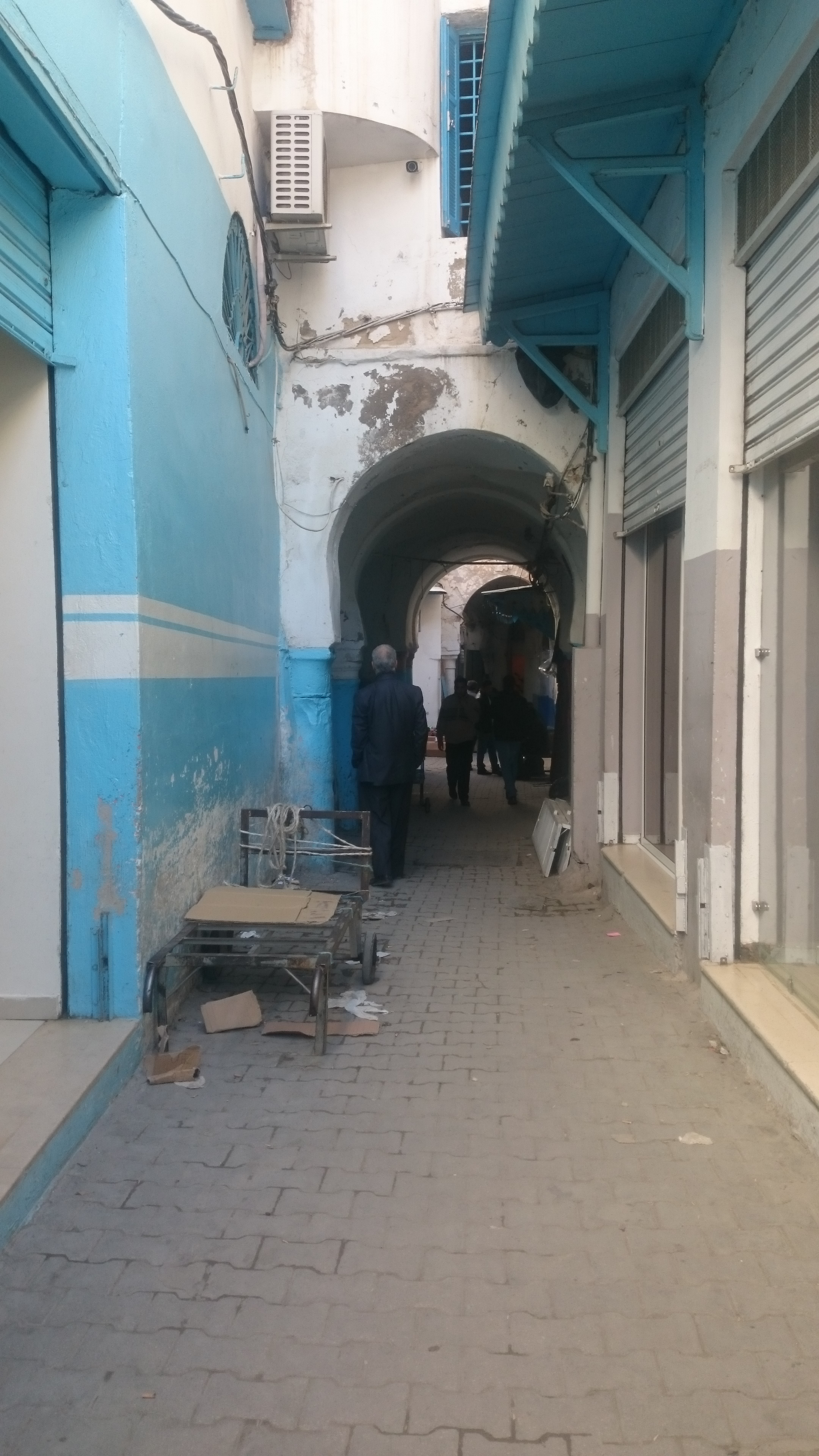 souk El Wzar